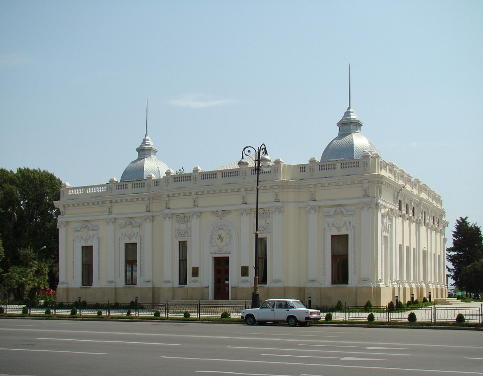 تاتر کودک (کوکلار تاتری)